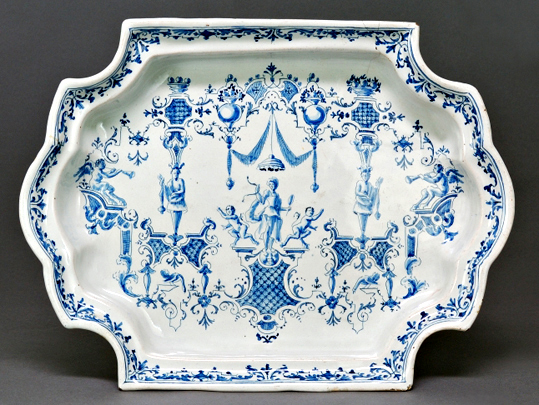 Vassoio polilobato con decoro alla "Bérain". Torino XVIII secolo.